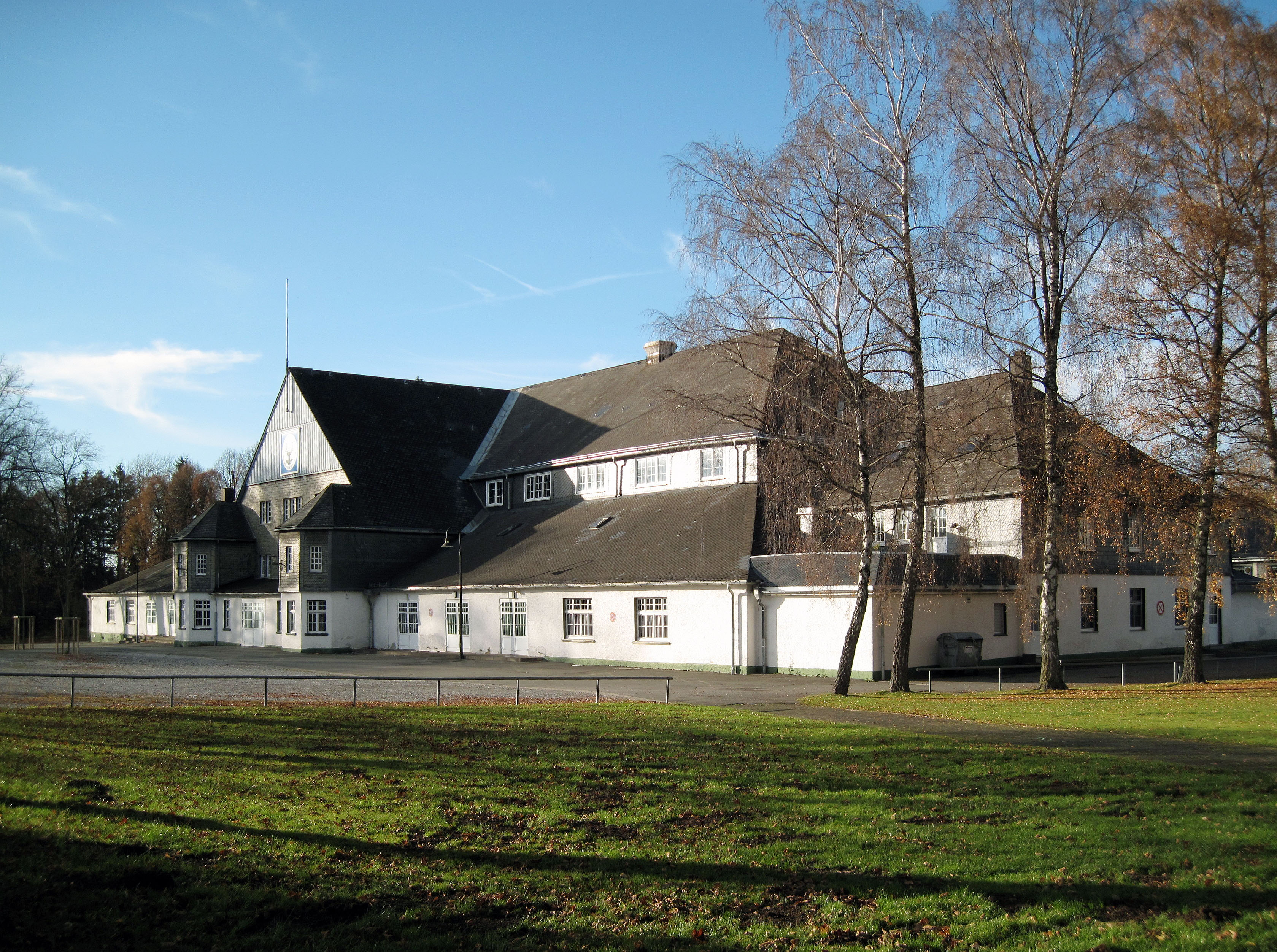 Brilon, Schützenhalle von außen 1